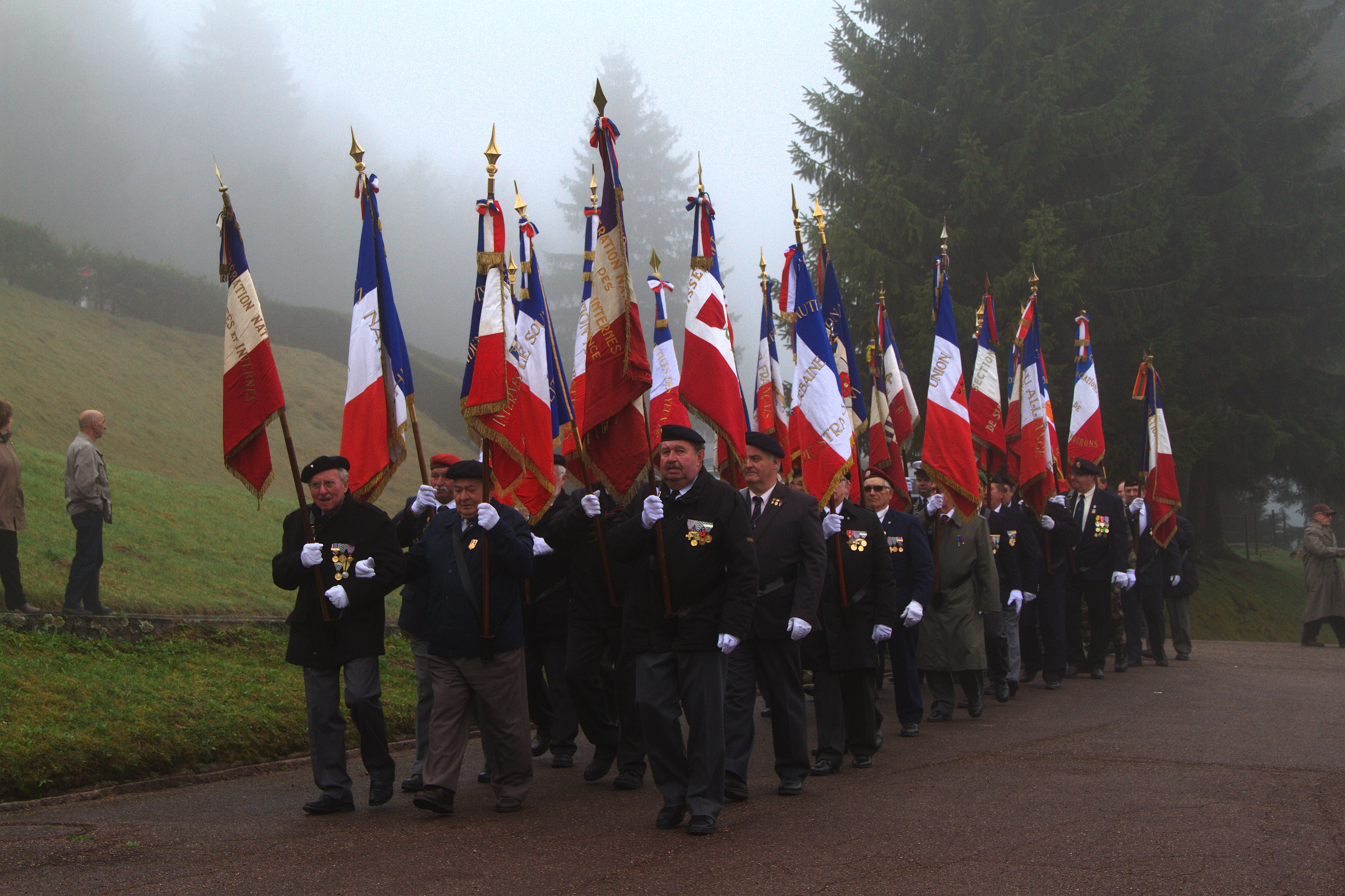 28 avril 2013 camp de Natzweiler-Struthof Journée nationale du souvenir de la déportation